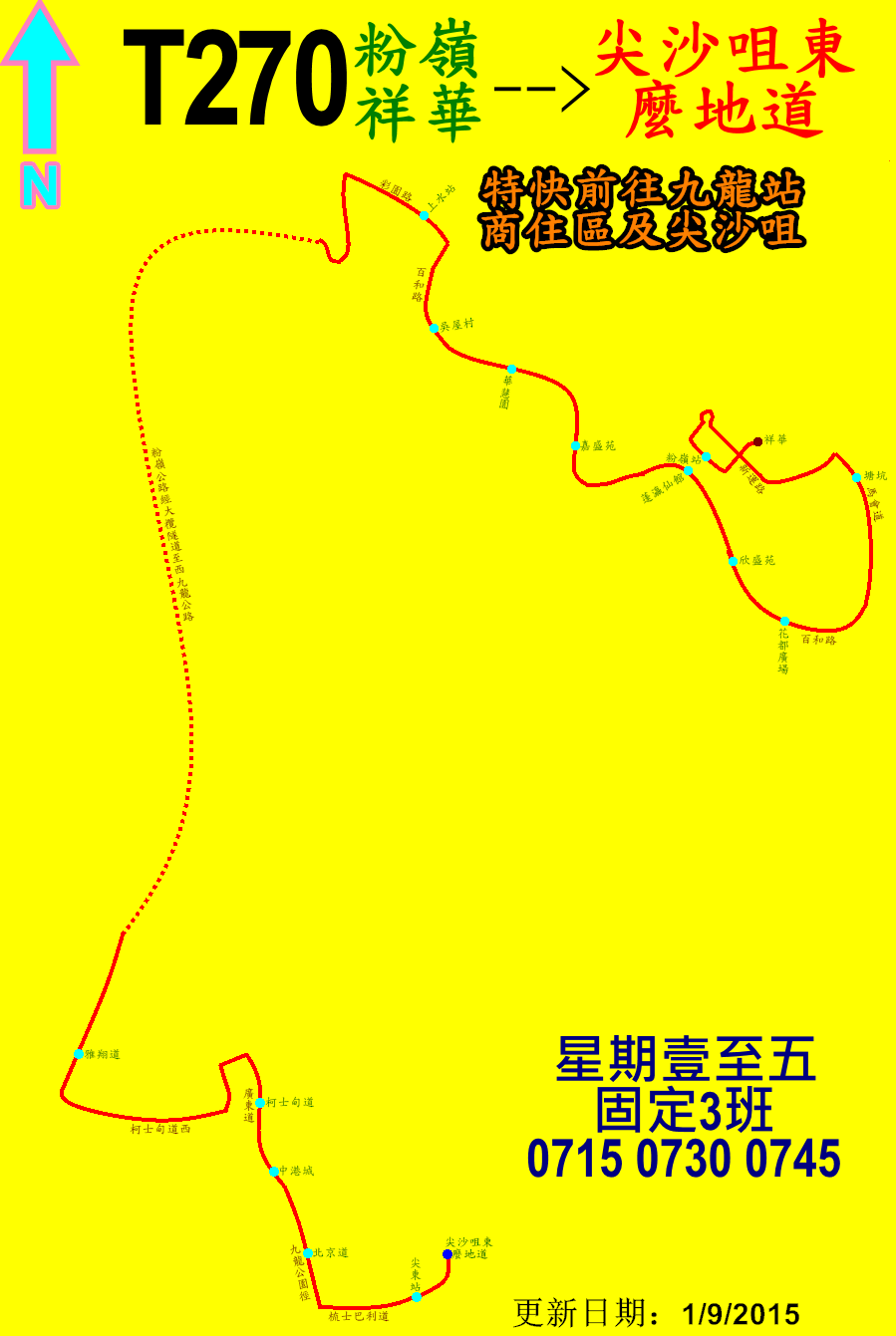 中文（香港）: 九巴T270線的走線圖